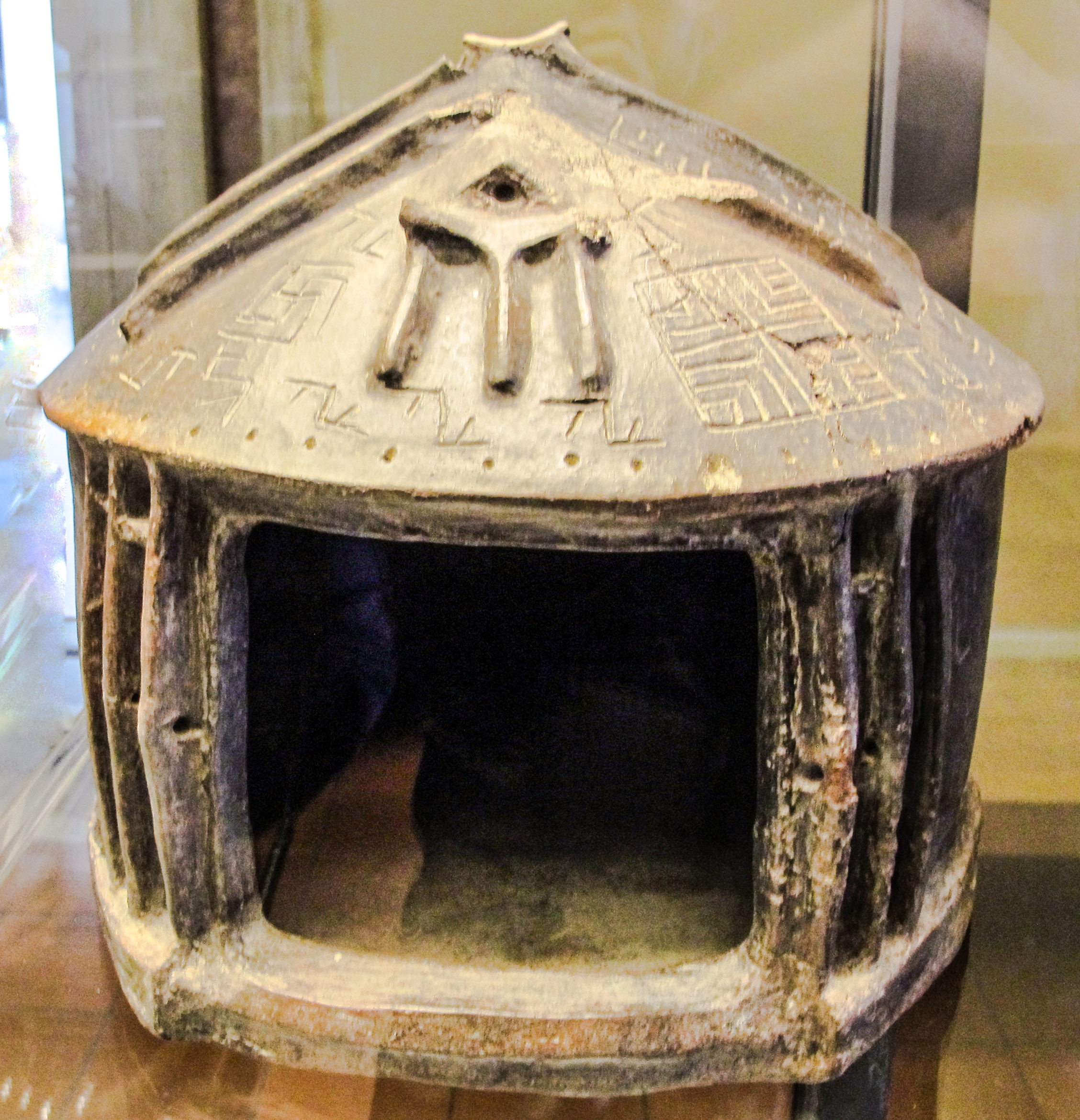 Museo Gregoriano Etrusco